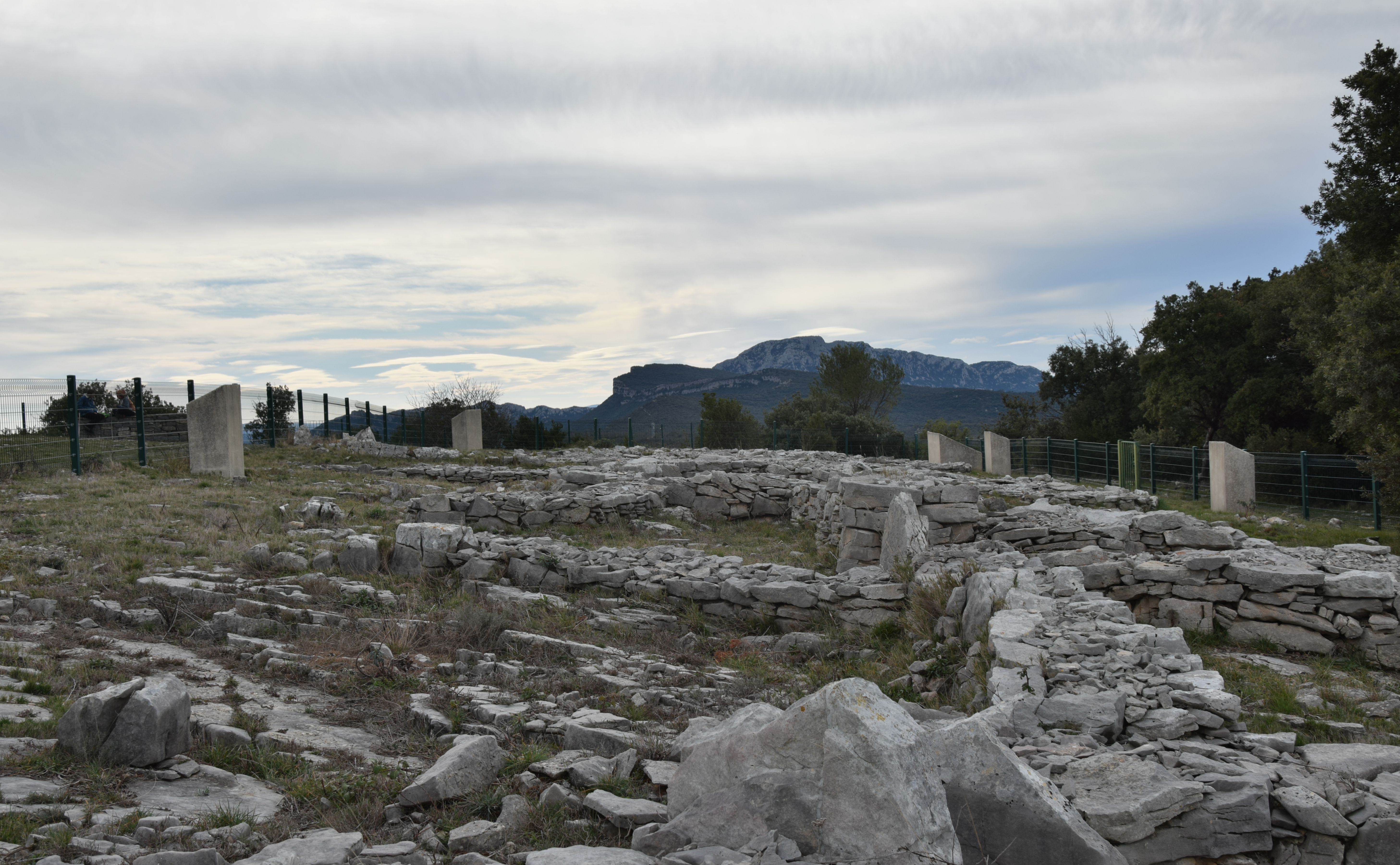 Le site est daté du Chalcolithique (2800 à 2200 ans av. J.-C.). Les fouilles archéologiques ont permis de mettre au jour plusieurs structures d’habitats construites en pierres sèches qui ont été rattachées à la culture de Fontbouisse.